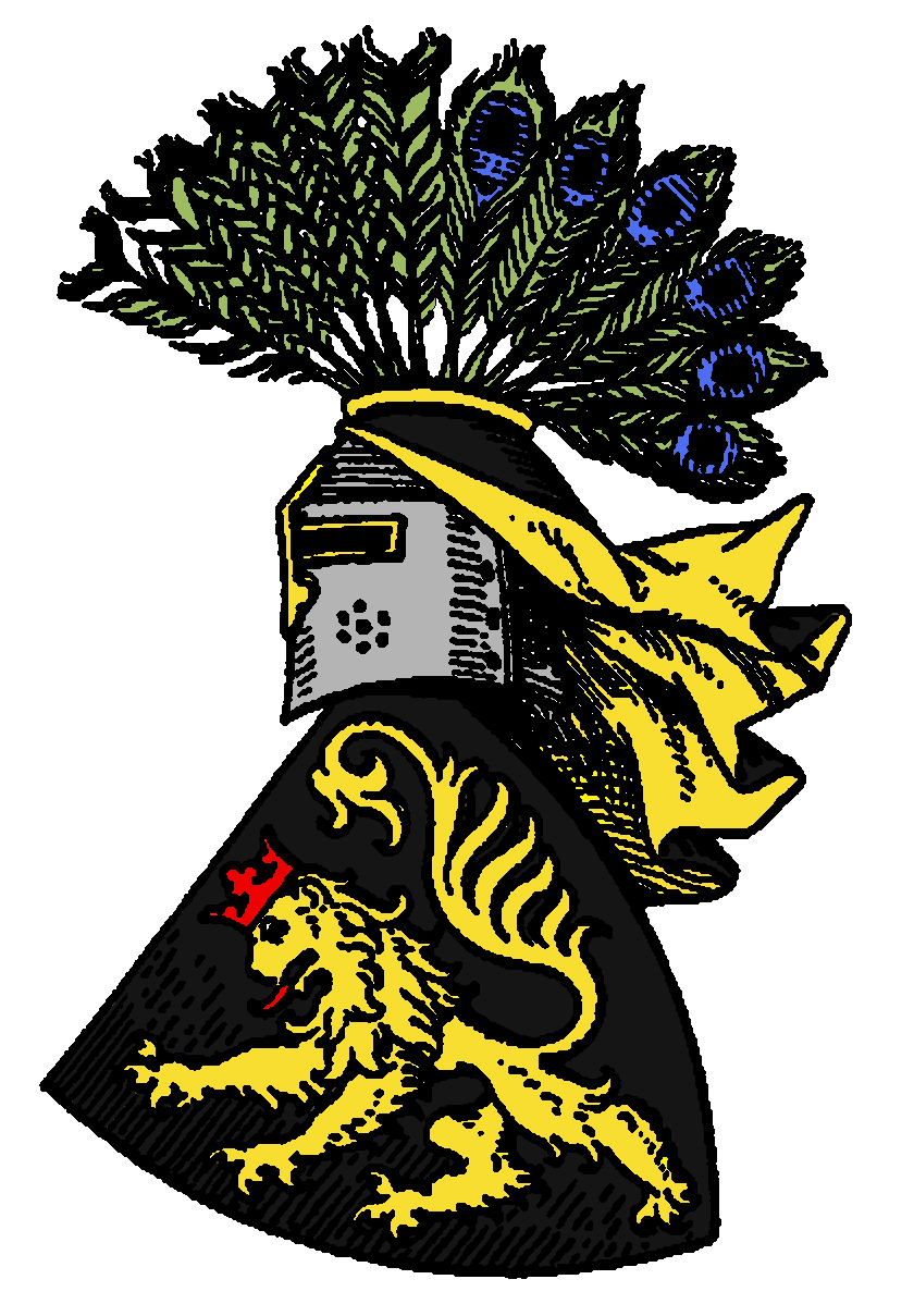 Stammwappen der Herren, Vögte (von Plauen, Weida, Gera), Grafen und Fürsten Reuss, nach der ältesten Darstellung (1279): Am 15. Dezember 1294 erteilte im Feldlager zu Borna Pfalzgraf Rudolf bei Rhein und Herzog von Bayern den Vögten Heinrich dem Älteren und Heinrich dem Jüngeren von Plauen, sowie den Vögten von Weida und Gera einen förmlichen Wappenbrief, worin er sagt, dass die Vorfahren der Vögte Schild und Banner von seinen, des Herzogs Vorfahren erhalten hätten. Der pfalzgräfliche Löwe ist seit 1230 nachweisbar, seit ca. 1240 gekrönt. Das erste Wappensiegel der Vögte von Weida ist von ca. 1240-44, alle frühren Siegel sind Gemmen. Die Verleihung von Wappen und Banner müsste also in diese Zeit fallen. Den eigentlichen Ursprung dürfte der Löwe von den Grafen von Everstein haben, die das gleiche Wappenbild (auch gleiche Helmzier) führten, nur in anderen Tinkturen (silbern-blau): Die Herrschaft Plauen gehörte 1122 den Grafen Everstein, 1236 erscheint Plauen zum ersten Mal im Besitz der Vögte von Weida. Eine Linie nannte sich danach Vögte von Plauen, mit Blauen als eversteinischgem Lehen. Es ist also nicht ausgeschlossen, dass das eversteinische Wappenbild (der Reussen) die pfalzgräflichen Tinkturen erhielt, vielleicht um 1261, als die Vögte von Weida, Gera und Plauen mit dem Vater des Pfalzgrafen Rudolf ein Kriegsbündnis abgeschlossen hatten. Erst 1370 wechselt die Helmzier der Linie Gera zum Brackenhaupt, das sie evtl. dem Haus Zollern verdankt, das Recht zu dieser Helmzier 1317 erkauft hatte (die silbern-schwarze Tinktur würde dafür sprechen). Um die Mitte des 15. Jahrhunderts wurde das Brackenhaupt von den Linien Reuss und Plauen ebenfalls übernommen.